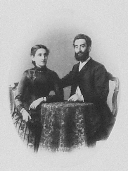 Portrait des Ehepaares Flora und Leonhard Tietz, Aufnahme eines anonymen Fotografen aus dem späten 19. Jahrhundert.